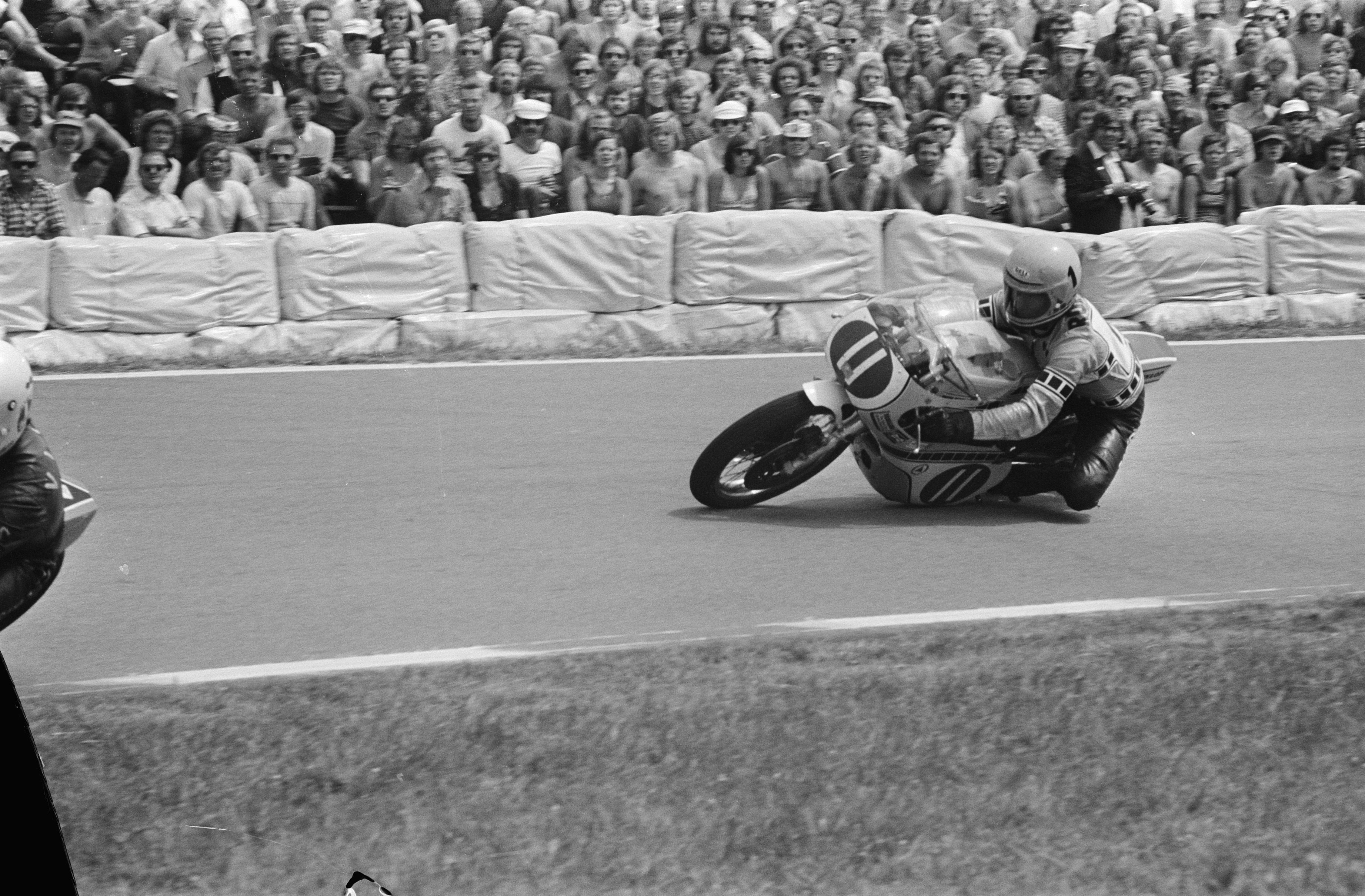 Collectie / Archief : Fotocollectie Anefo Reportage / Serie : TT Assen 1974 Beschrijving : 250cc. Kenny Roberts (USA) (11) in actie Annotatie : Debuut in Europa Datum : 29 juni 1974 Locatie : Assen Trefwoorden : circuits, motorcoureurs, motorfietsen, motorsport, races Instellingsnaam : TT Fotograaf : Peters, Hans / Anefo Auteursrechthebbende : Nationaal Archief Materiaalsoort : Negatief (zwart/wit) Nummer archiefinventaris : bekijk toegang 2.24.01.05 Bestanddeelnummer : 927-2905